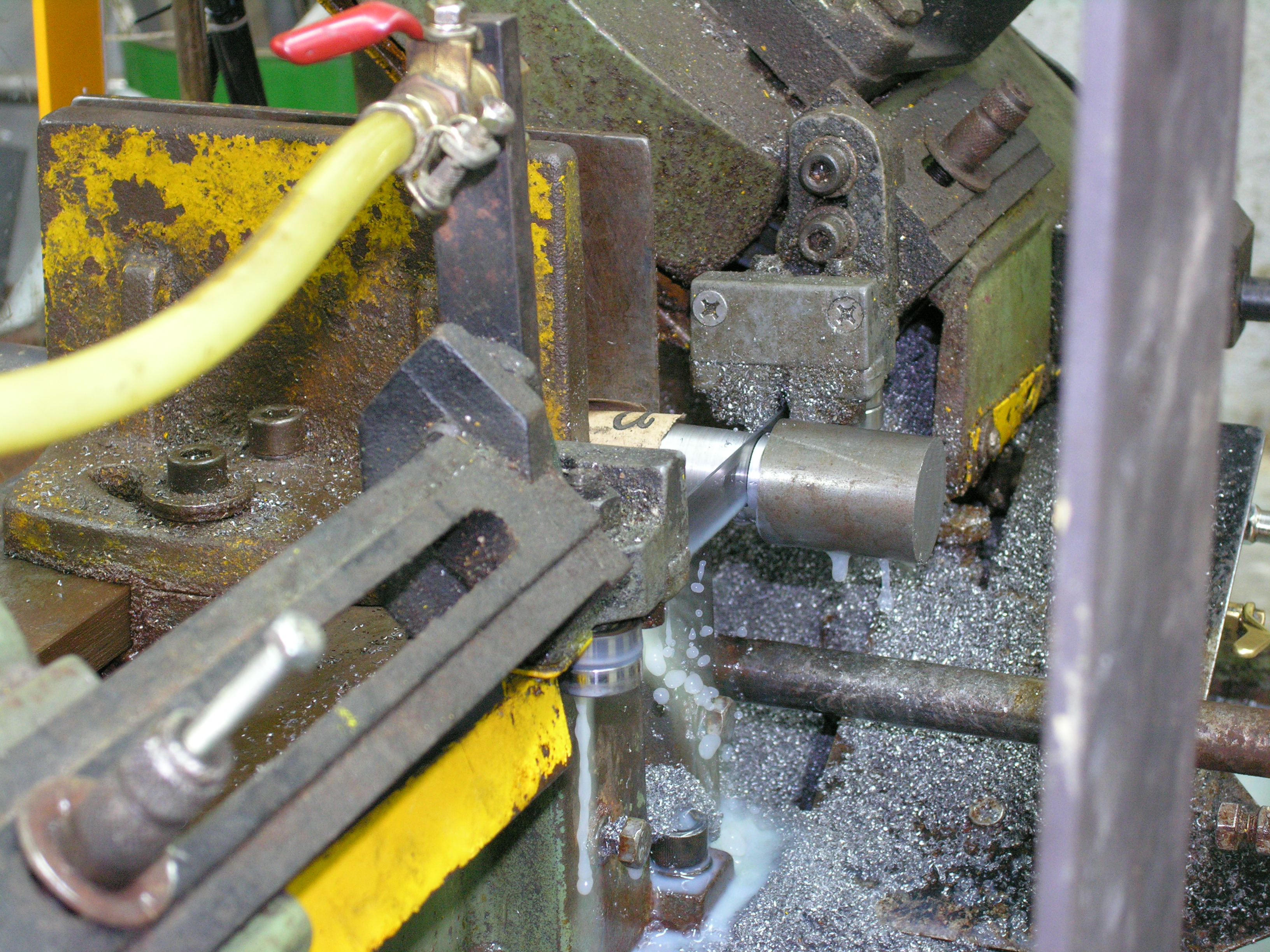 En la imagen se puede ver una sierra de cinta que se lubrica mediante taladrina